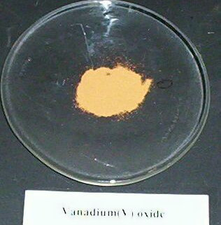 Vanadium(V) oxide (vanadium pentoxide). Picture taken November 2004.